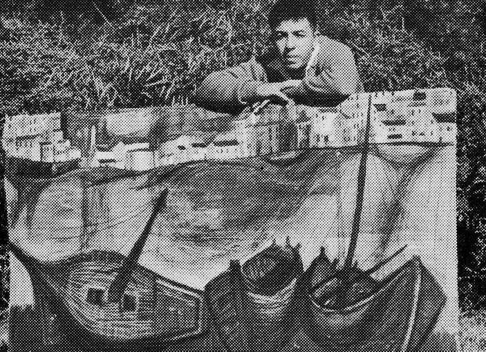 אברהם אופק בקיבוץ עין המפרץ, 1952